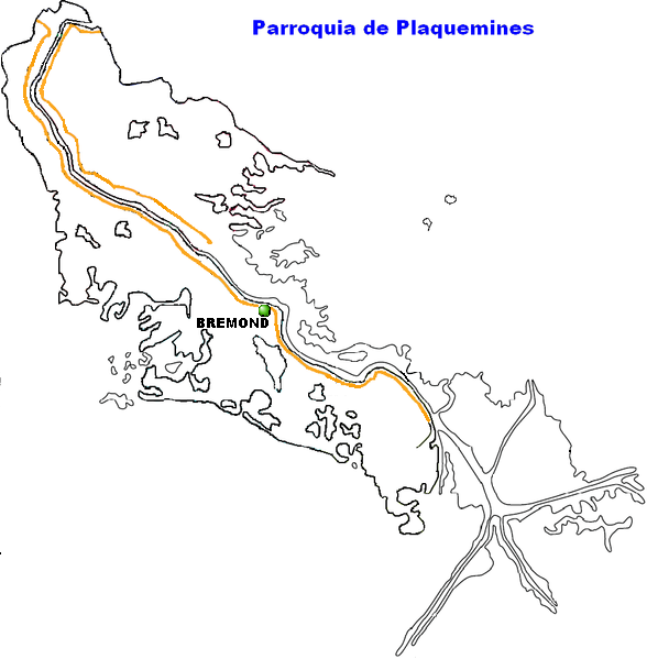 Bremond Louisiana.